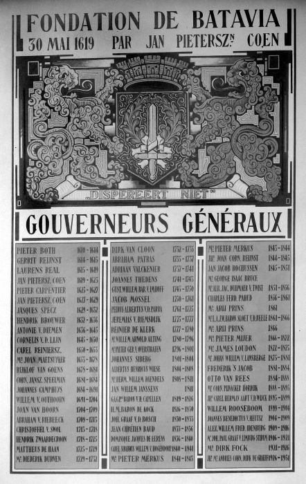 Negatief. Het Wapen van Batavia met daaronder een lijst met personen die het ambt van Gouverneur-Generaal in Nederlands-Indië bekleed hebben in de periode 1610-1931